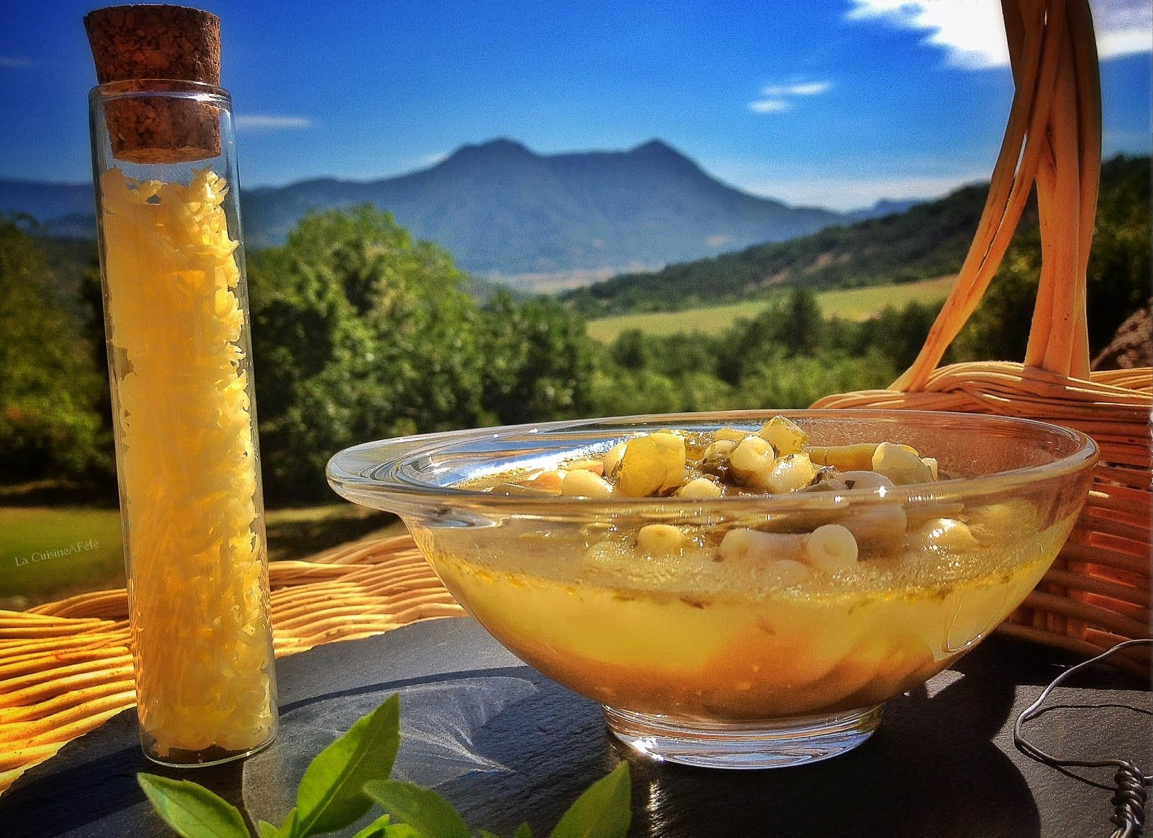 Soupe au pistou dans les Alpes provençales